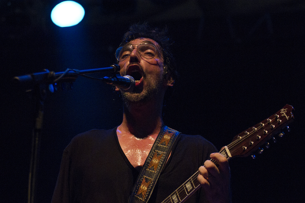 Circo Voador - Lapa